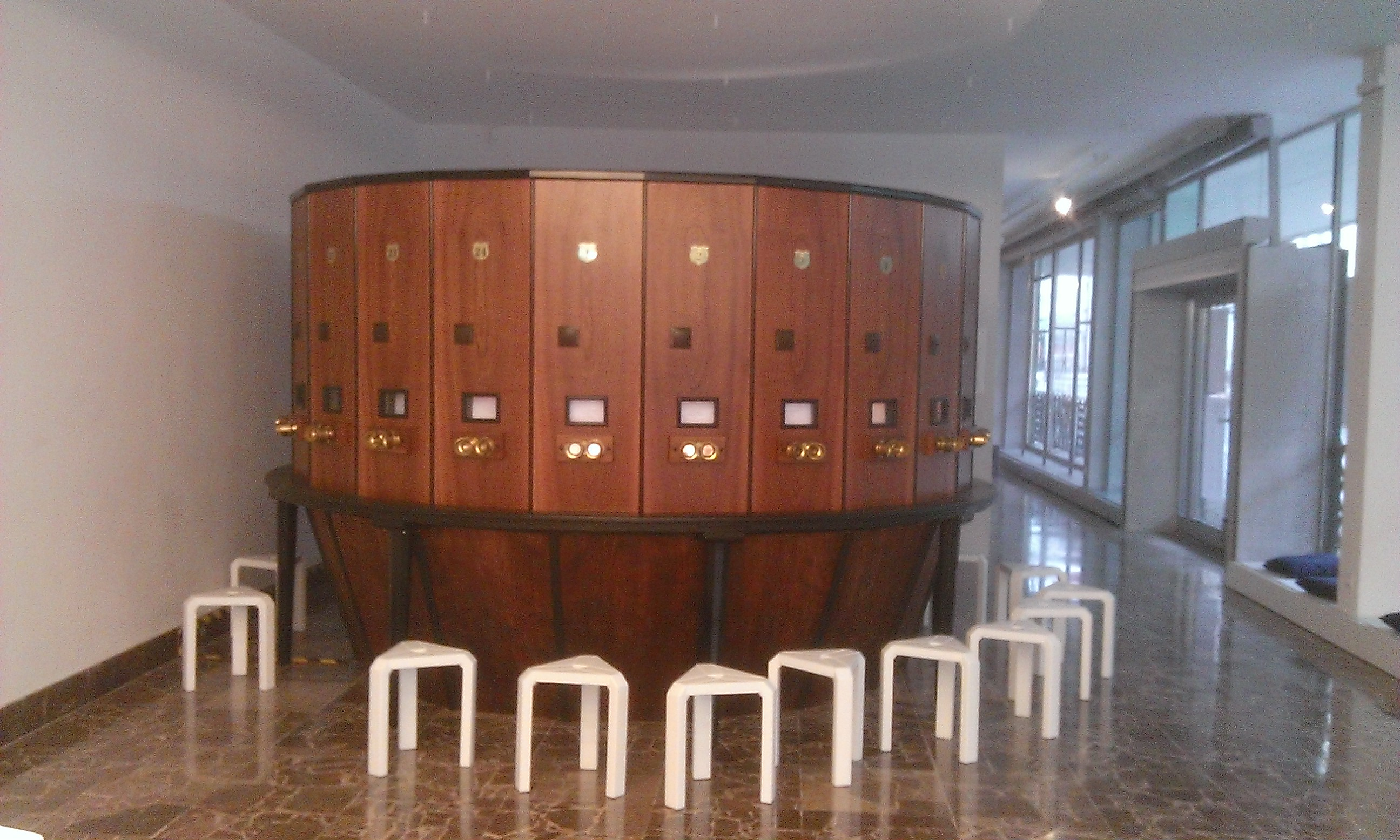 Fotoplastykon w Poznaniu, Galeria Miejska "Arsenał" - listopad 2014